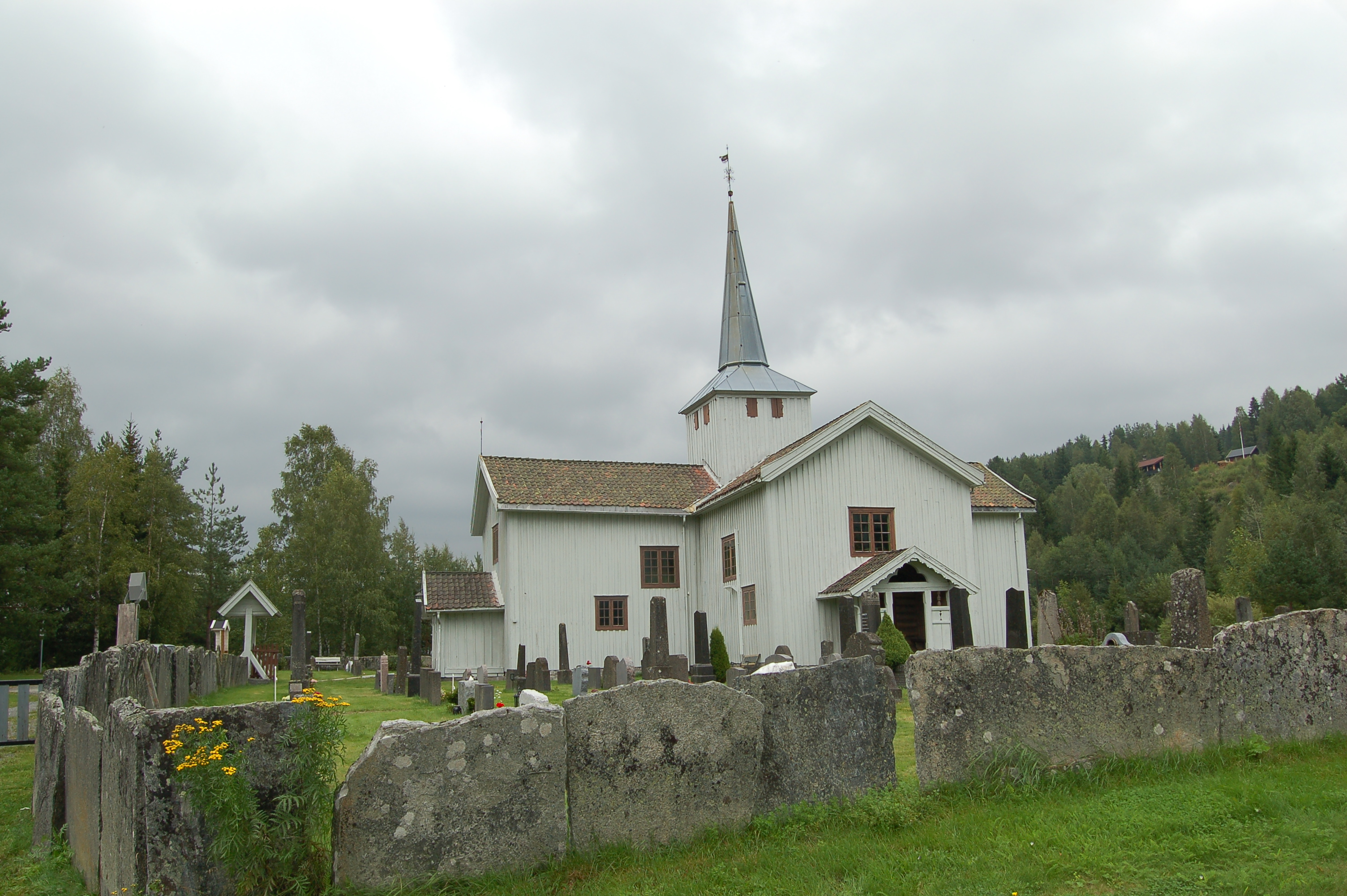 Svene kirke